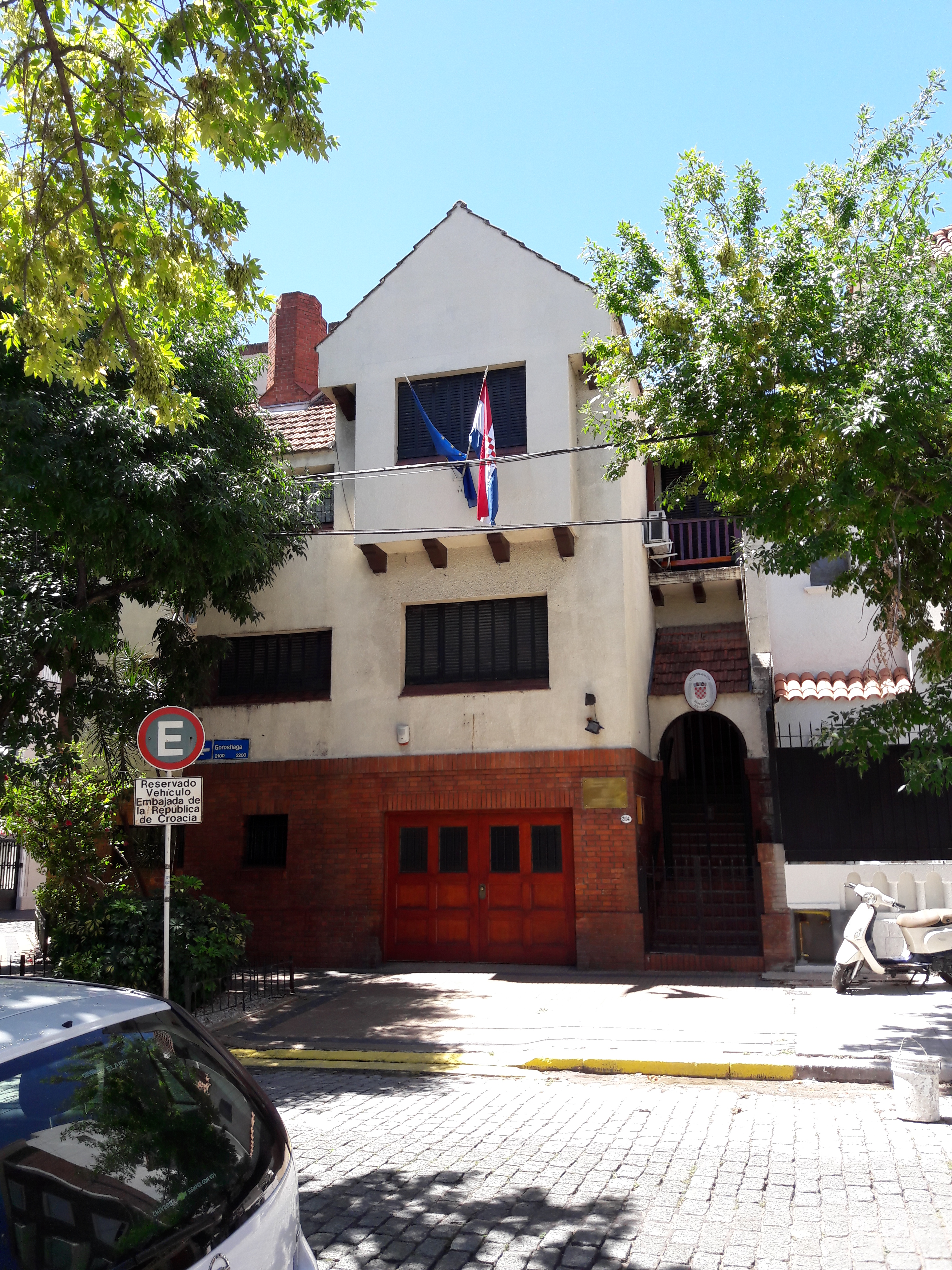 Embajada de Croacia, Palermo, Buenos Aires, Argentina.